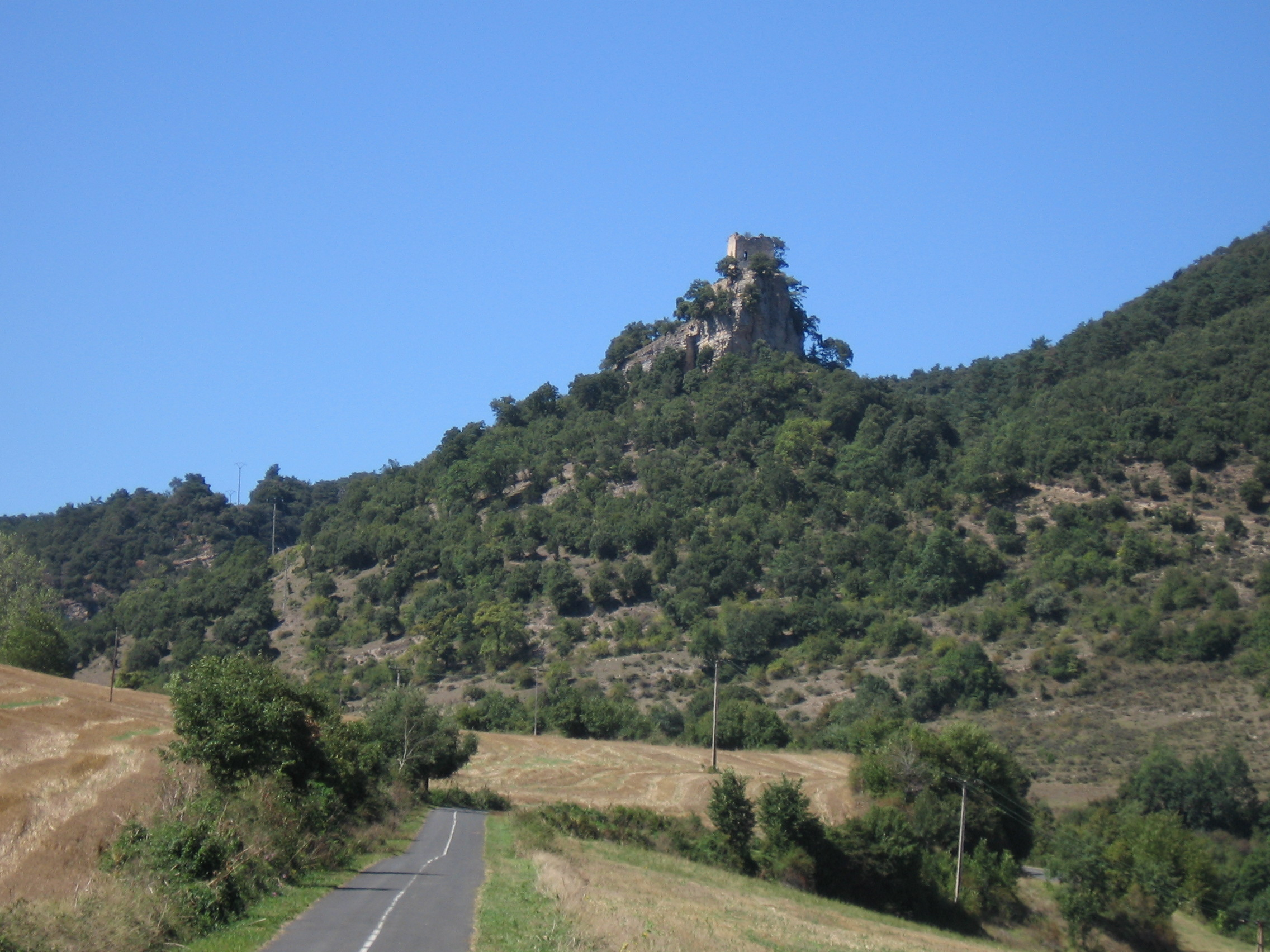 Restos del castillo de Astulez